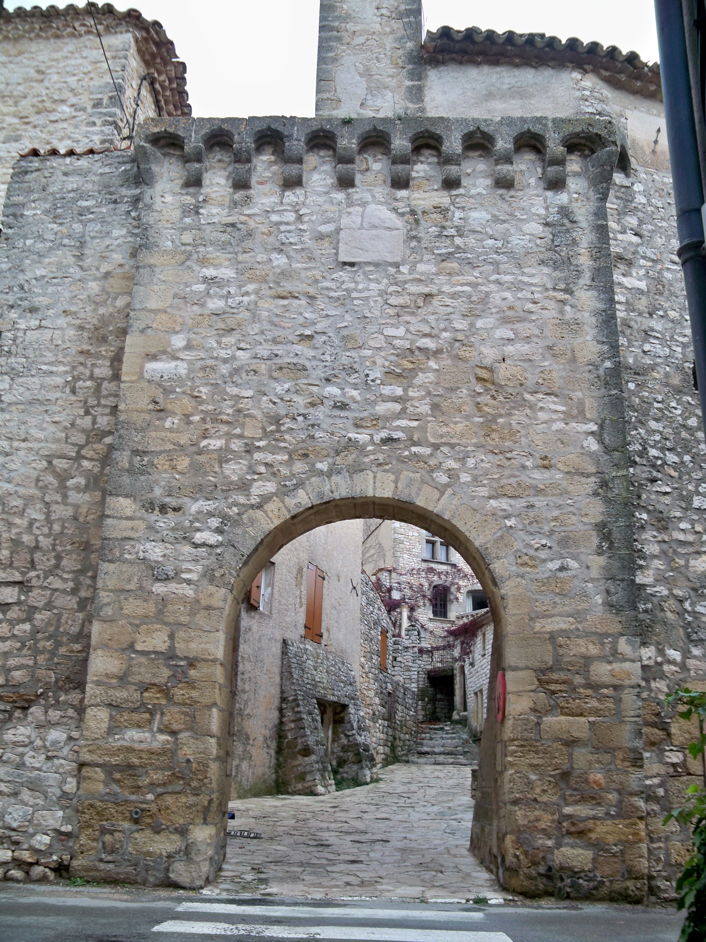 "Grand Portail" Ancienne porte de la ville de Vachères (04)